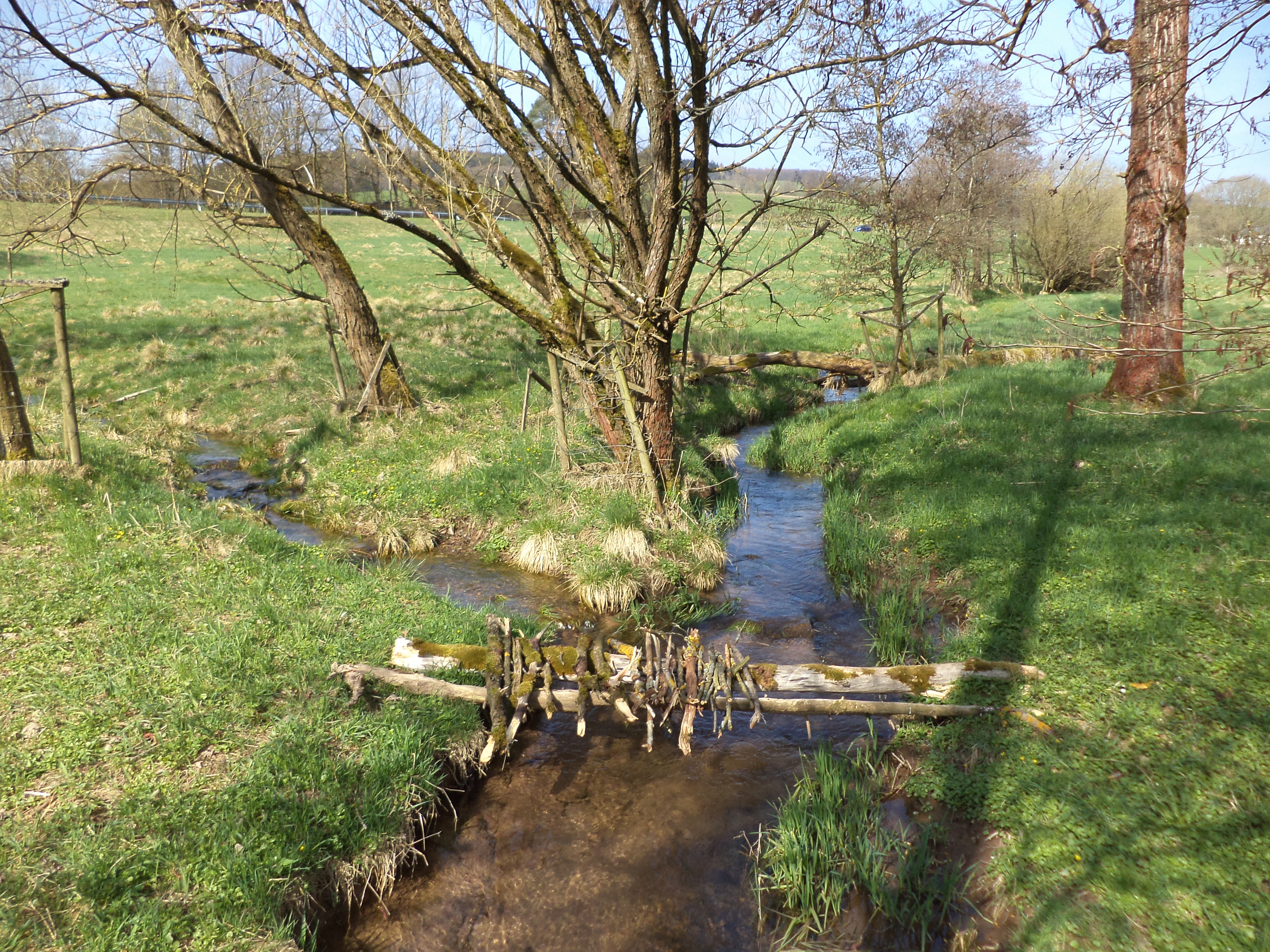 Der Hungerbach (links) mündet in die Jossa (von hinten nach vorne)